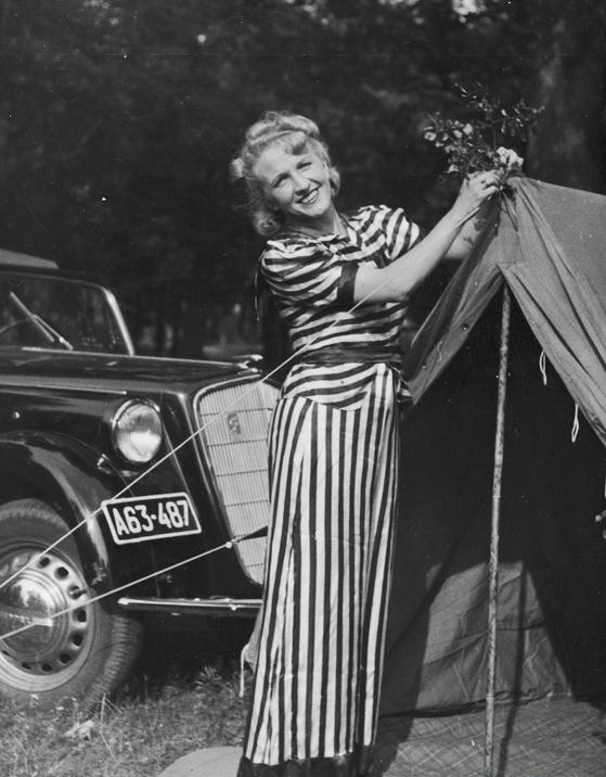 Polska śpiewaczka i aktorka Ola Obarska.